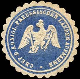 Sealing stamp Title: Chef der K. Pr. Landes Aufnahme Description: blau, weiß, geprägt Place: size: 3 cm